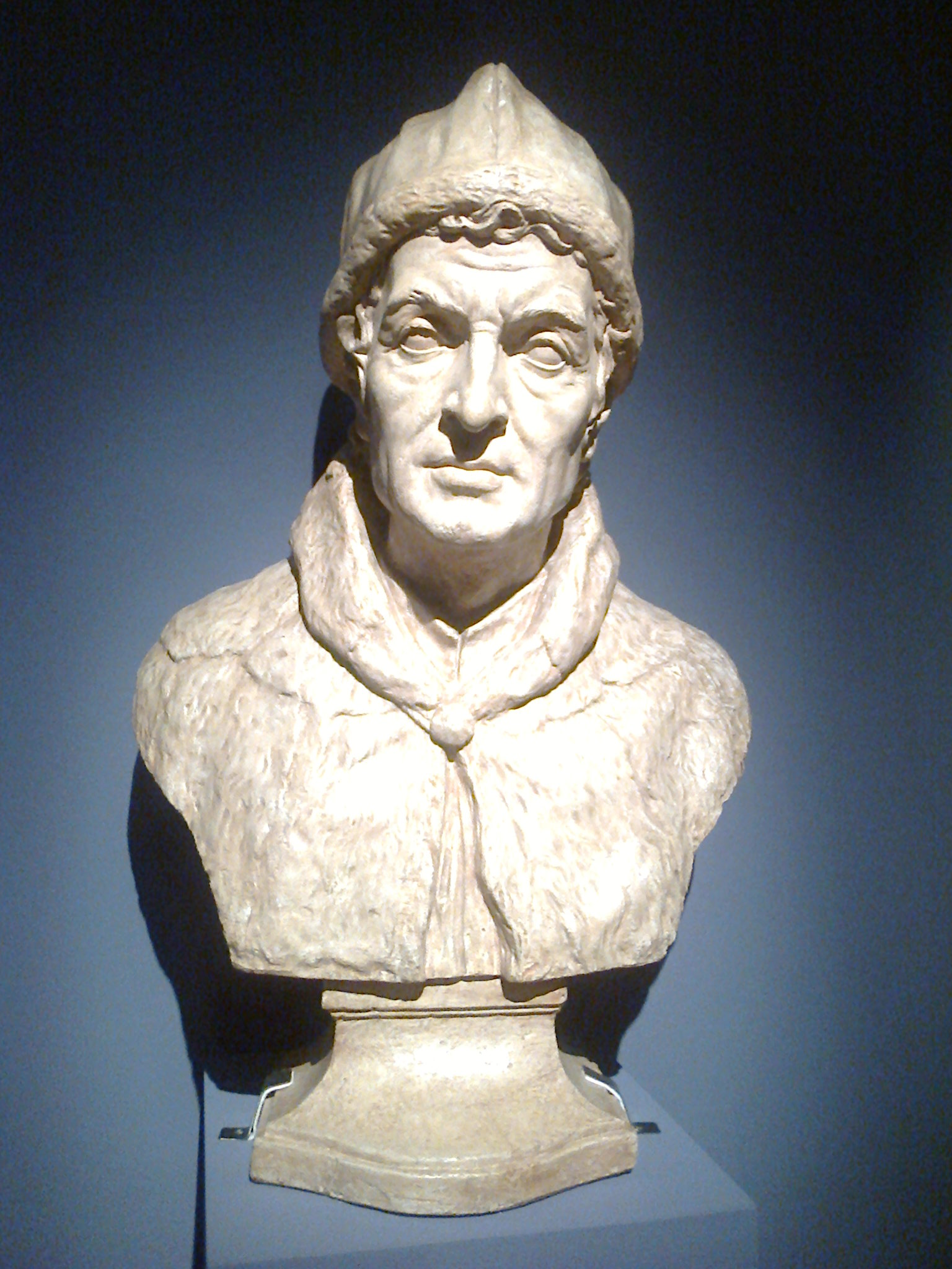 Popiersie Jana Długosza autorstwa Franciszka Wyspiańskiego.